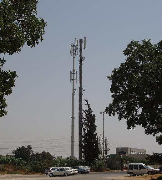 טלפון סלולרי - אנטנה. צילם דוד שי